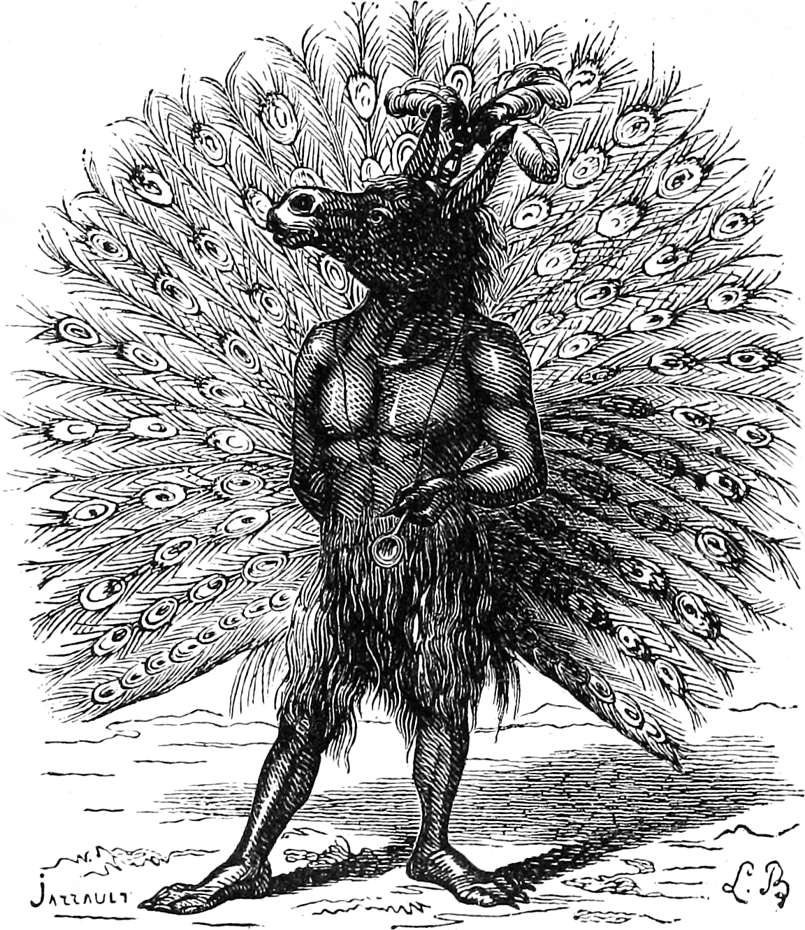 Une illustration pour l’article Adramelech dans le Dictionnaire infernal par Collin de Plancy.